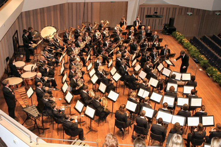 O&U in het Frits Philips Muziekcentrum in Eindhoven